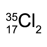 Chlorum-35-molecule